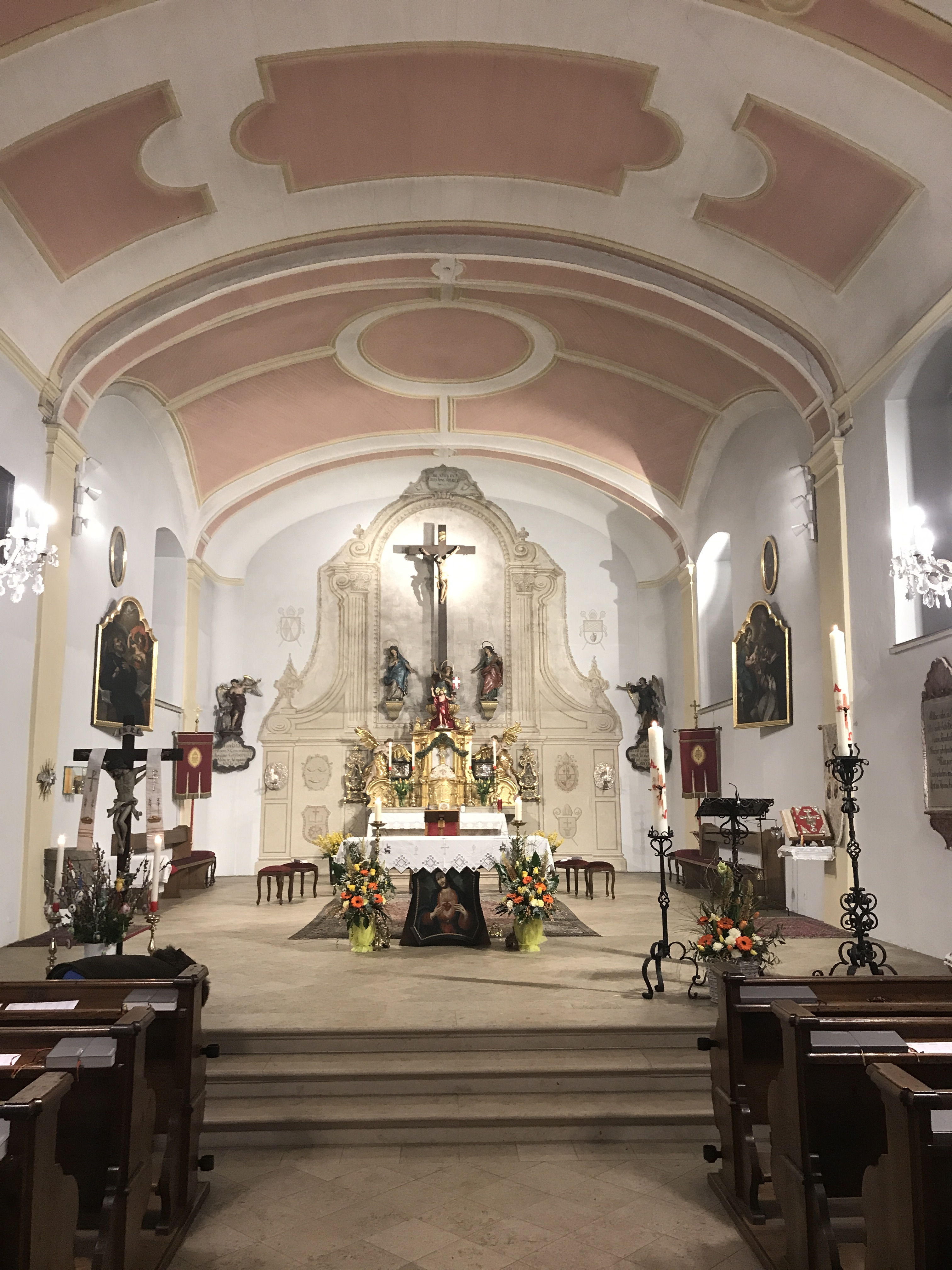 Pfarrkirche Hall bei Admont (Austria), Inneres der Kirche